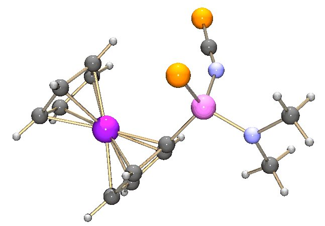 Sucrose chemical structure